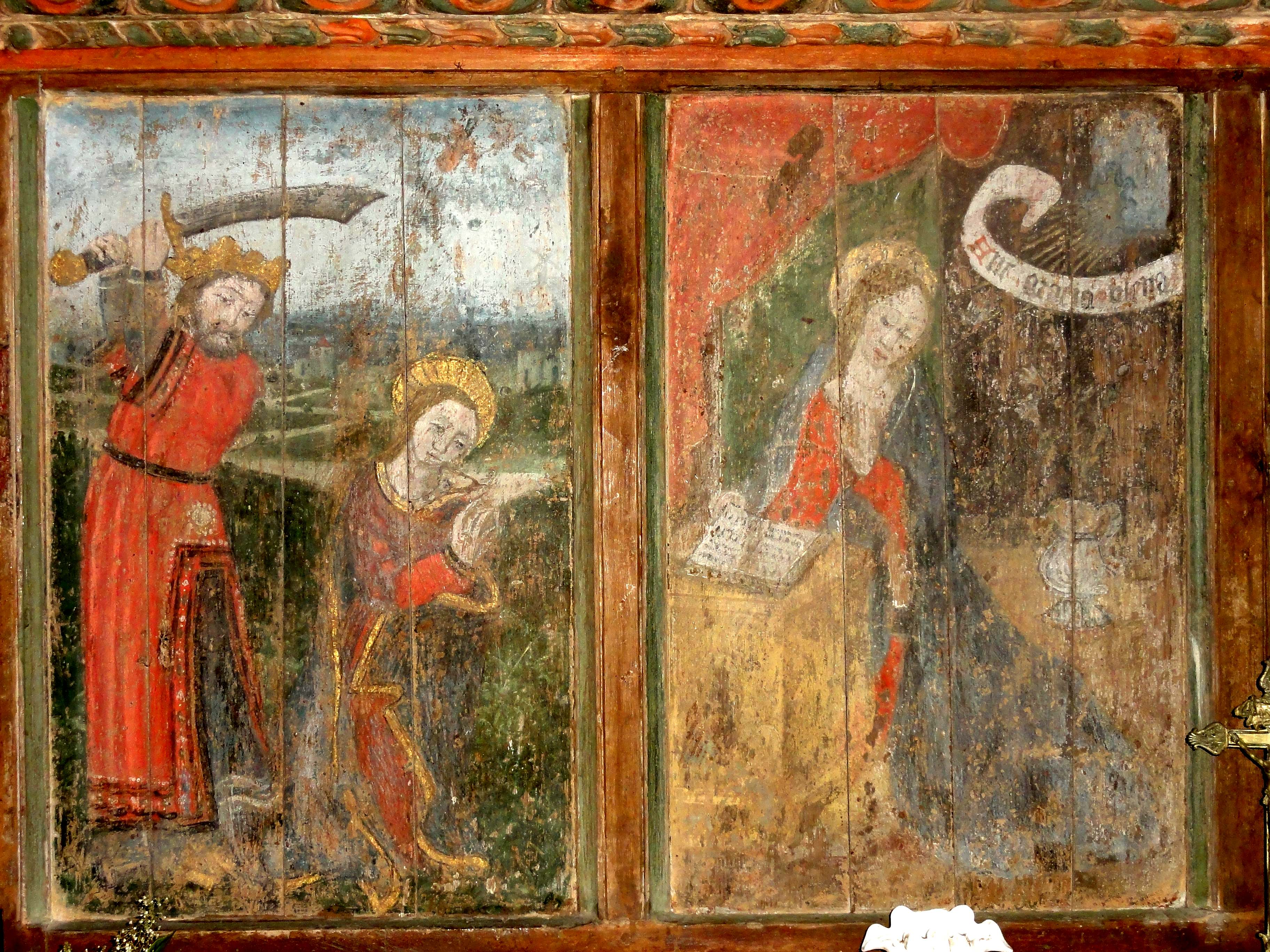 Banc d'œuvre ; ancien retable et dais d'autel du XVe siècle (voir titre).